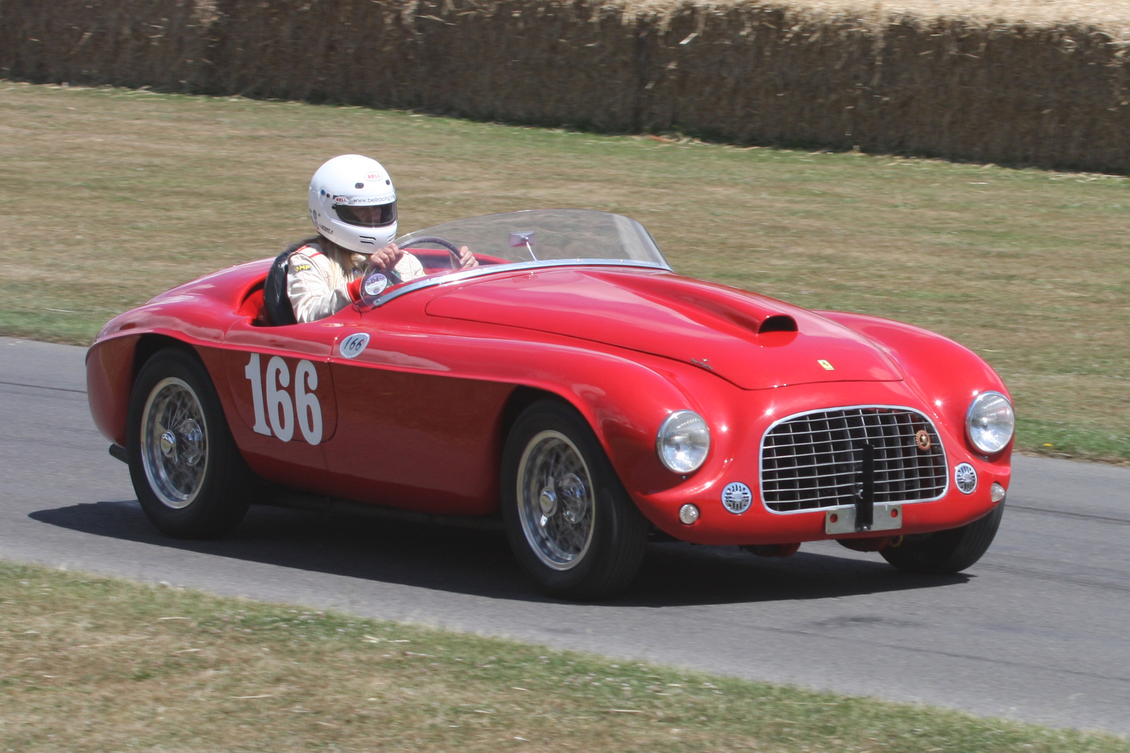 1950 Ferrari 166 MM Barchetta